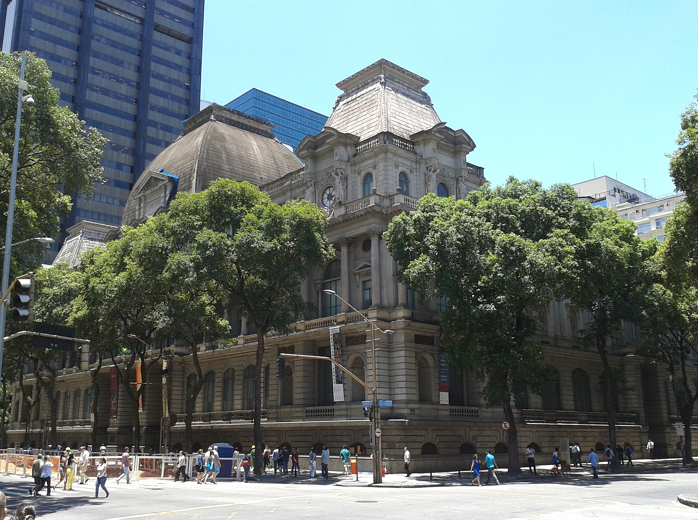 Fachada principal do Museu Nacional de Belas Artes, Rio de Janeiro, RJ, Brasil.